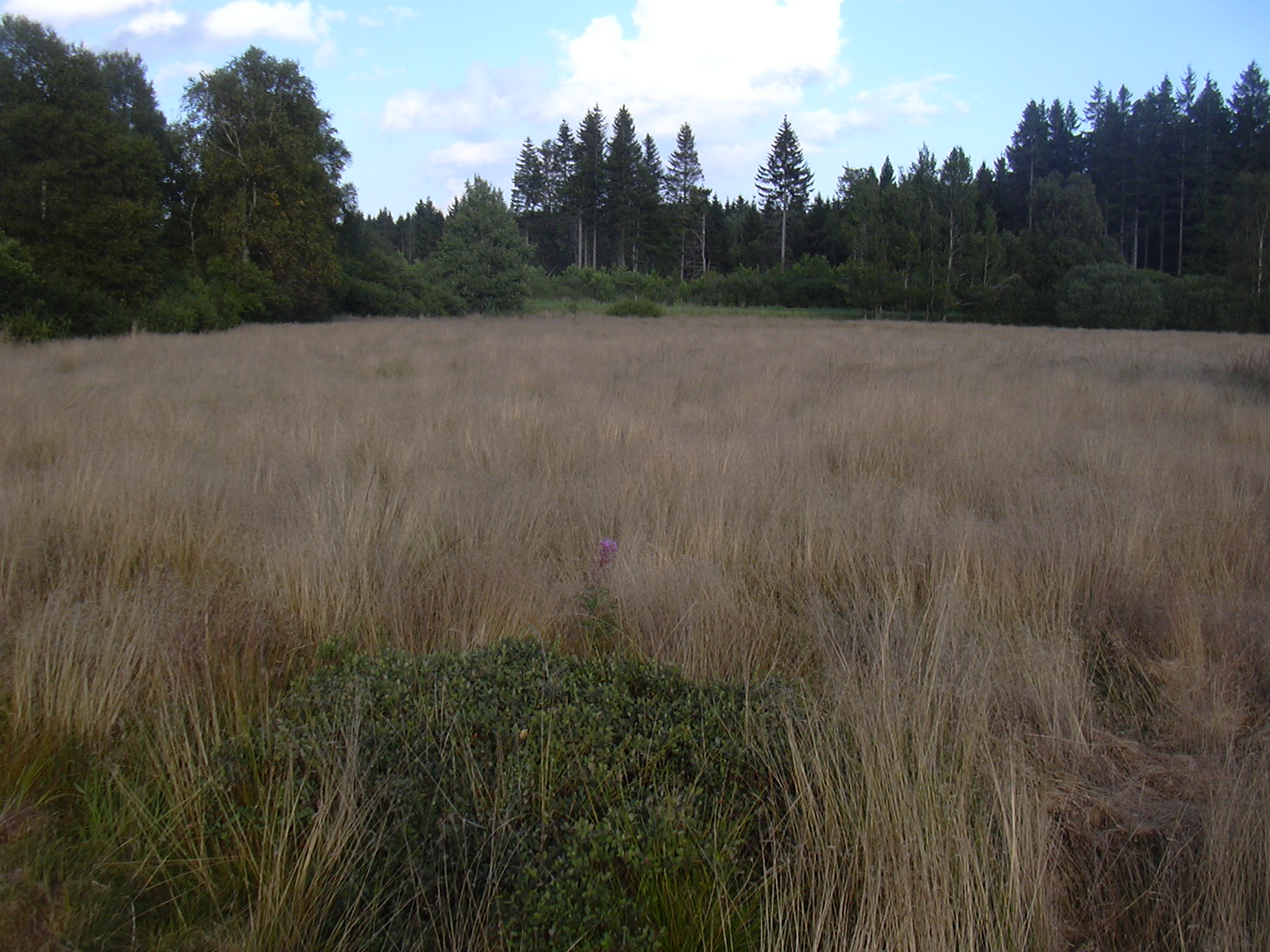 Black Moor, Rhön, Bavaria/Germany